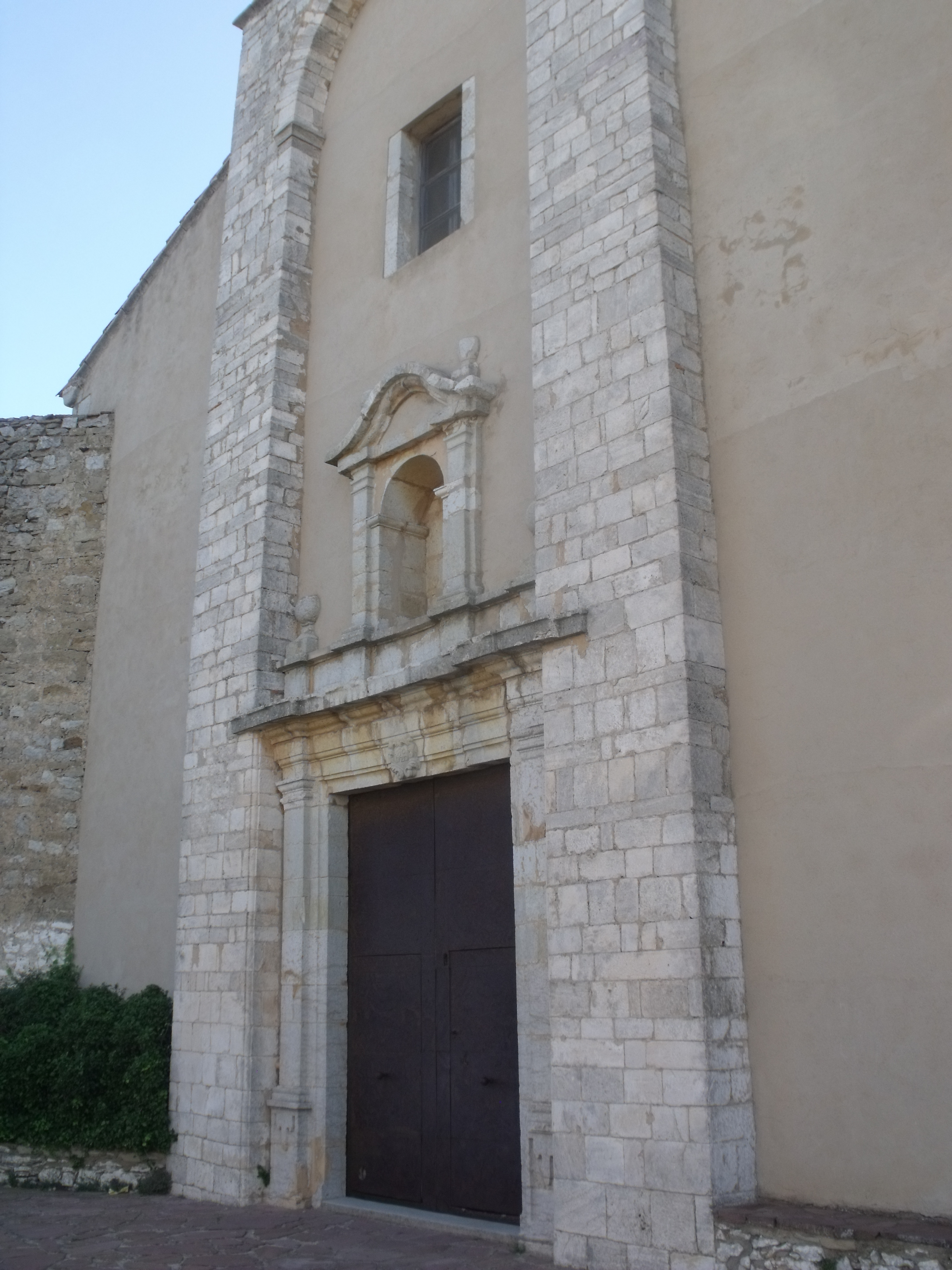 Puerta de la ermita de San Cristobal